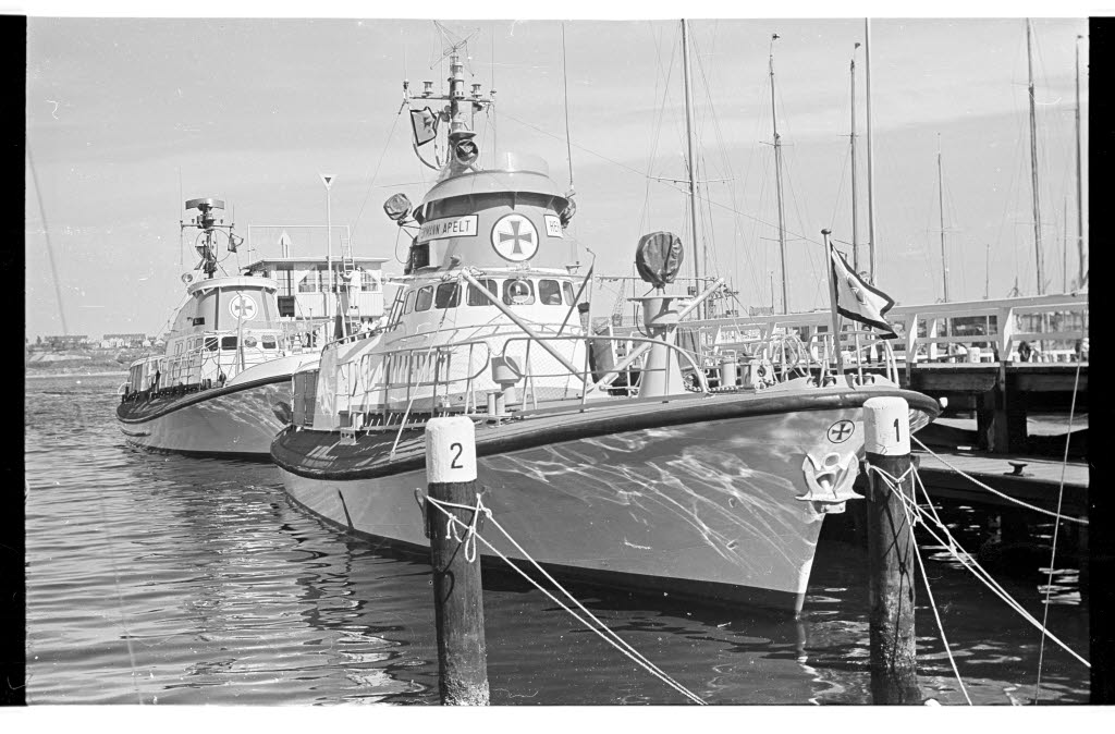 im Sportboothafen Düsternbrook.